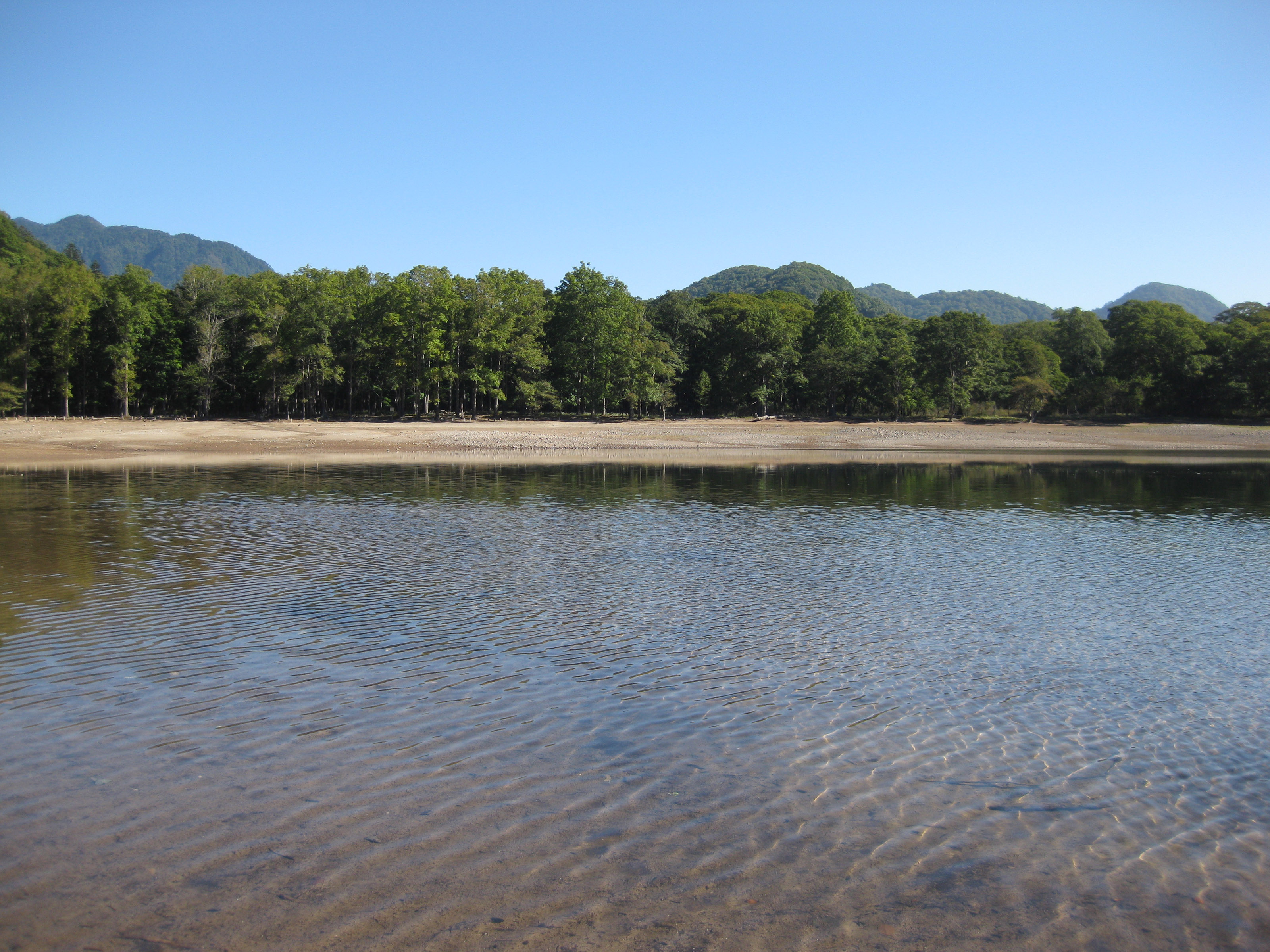 Sai-no-ko (西ノ湖), Nikkō, Japan.